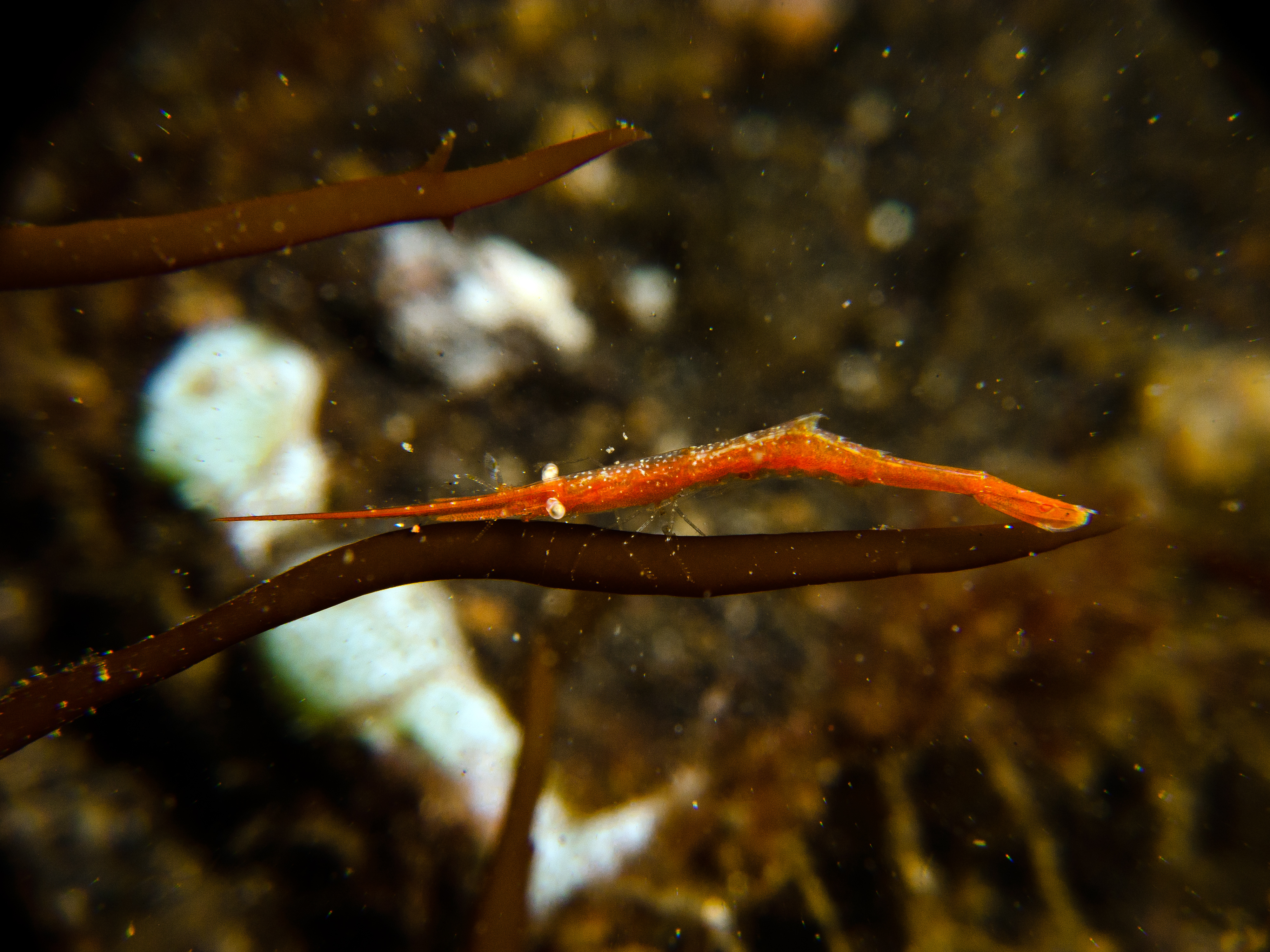 Ocellated Tozeuma Shrimp - Tozeuma lanceolatum